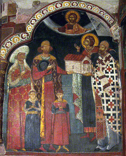 Ktitor Radivoj (Kremikovski monastery)